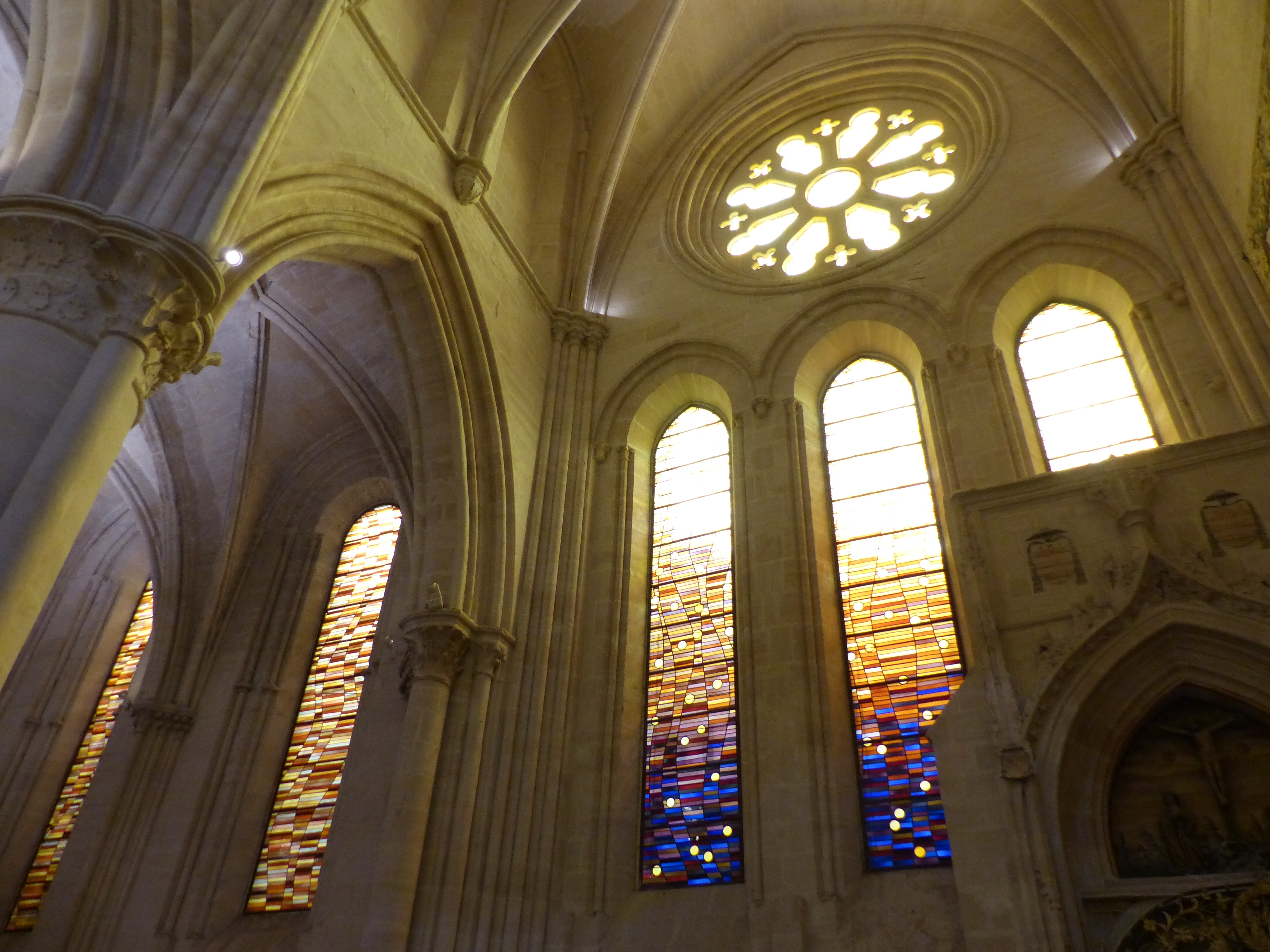 Interior de la Catedral de Cuenca, España